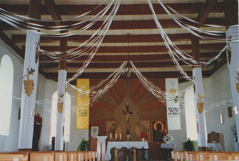 Kościół w Wojcieszycach. Wnętrze (stan przed rokiem 1946)